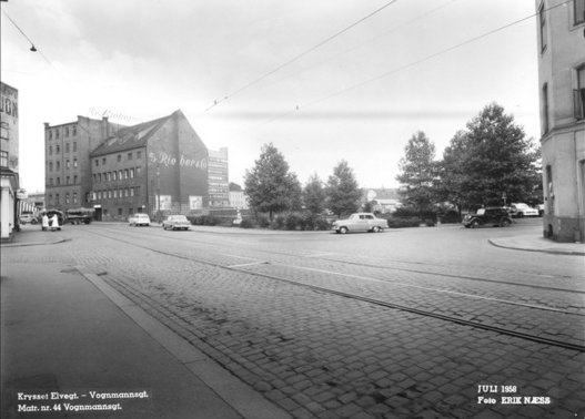 G. C. Rieber & Co Oslo Pelsfabrikk, Vognmannsgata 44-46, 1958